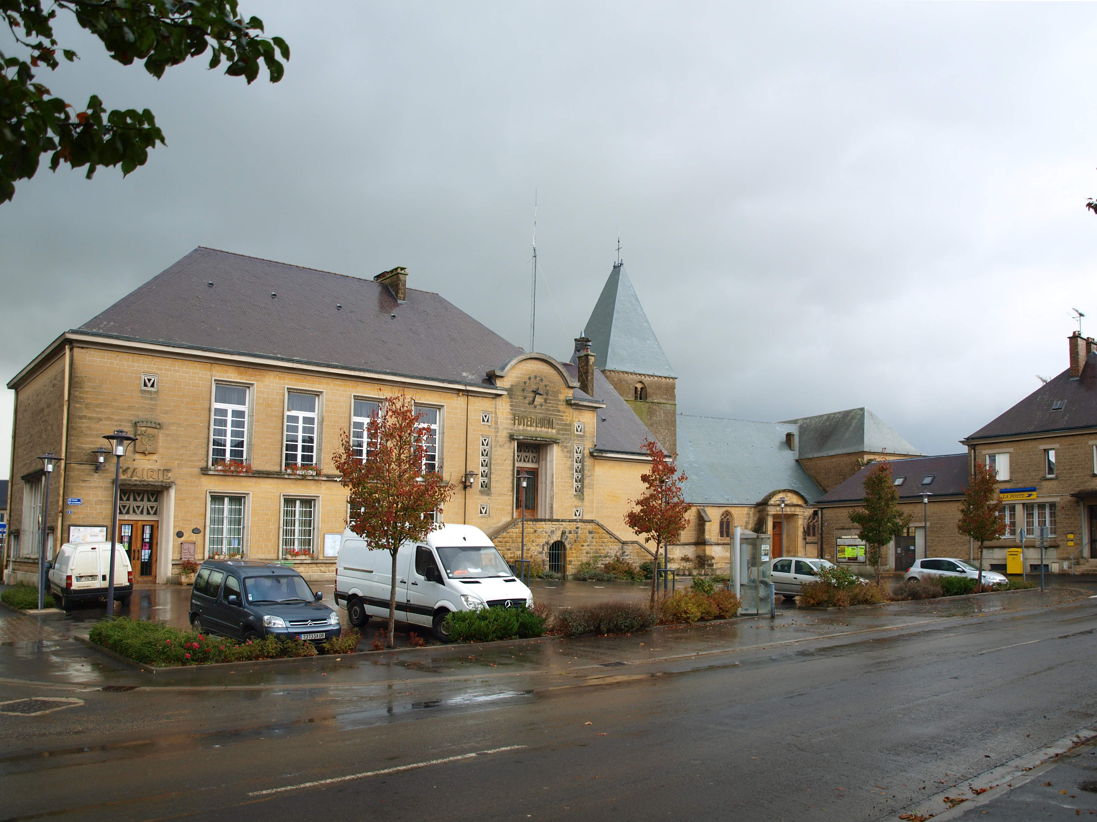 Le Chesne (Ardennes, France), la mairie